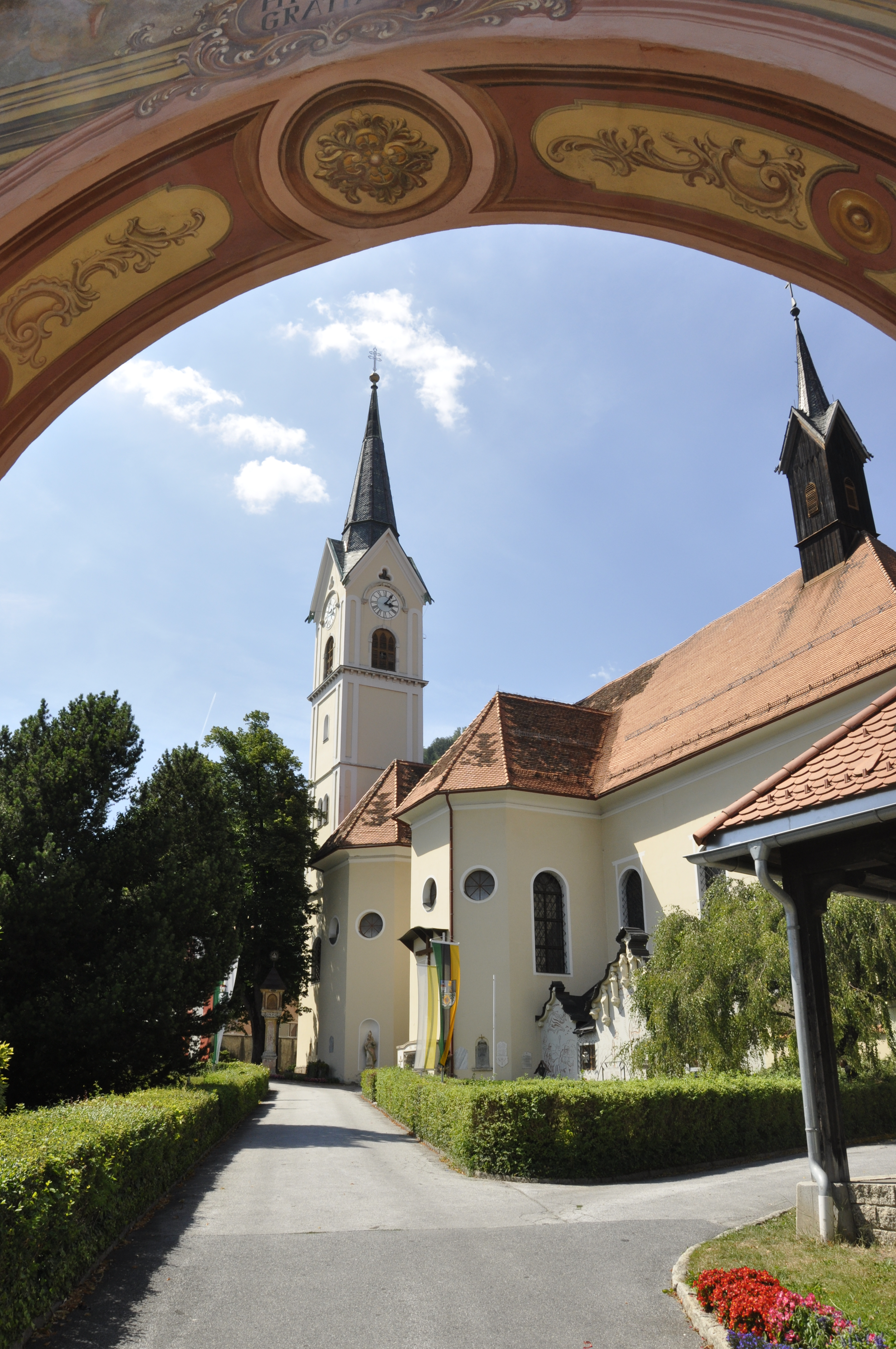 Kath. Pfarrkirche, Wallfahrtskirche Mariä Himmelfahrt